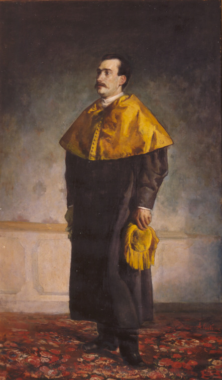 Retrato del médico oculista español José Aparicio García (1839-1894). Nació el 19 de abril de 1839, vivió en Valencia y falleció en el manicomio barcelonés de Nuevo Belén el 10 de mayo de 1894. No dejó descendencia de su único matrimonio con Francisca Comín Olmos.